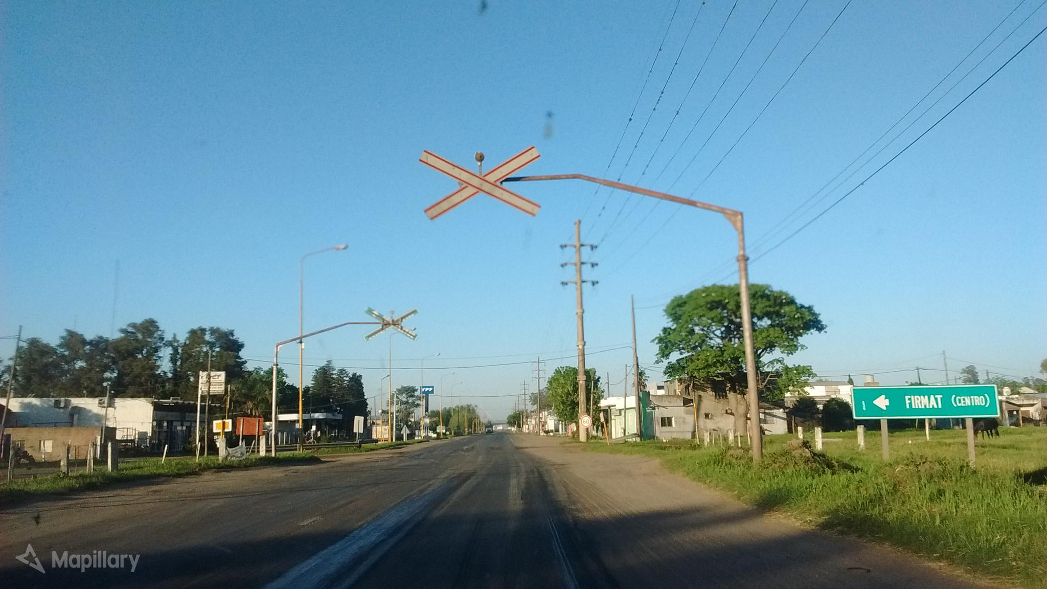 Firmat